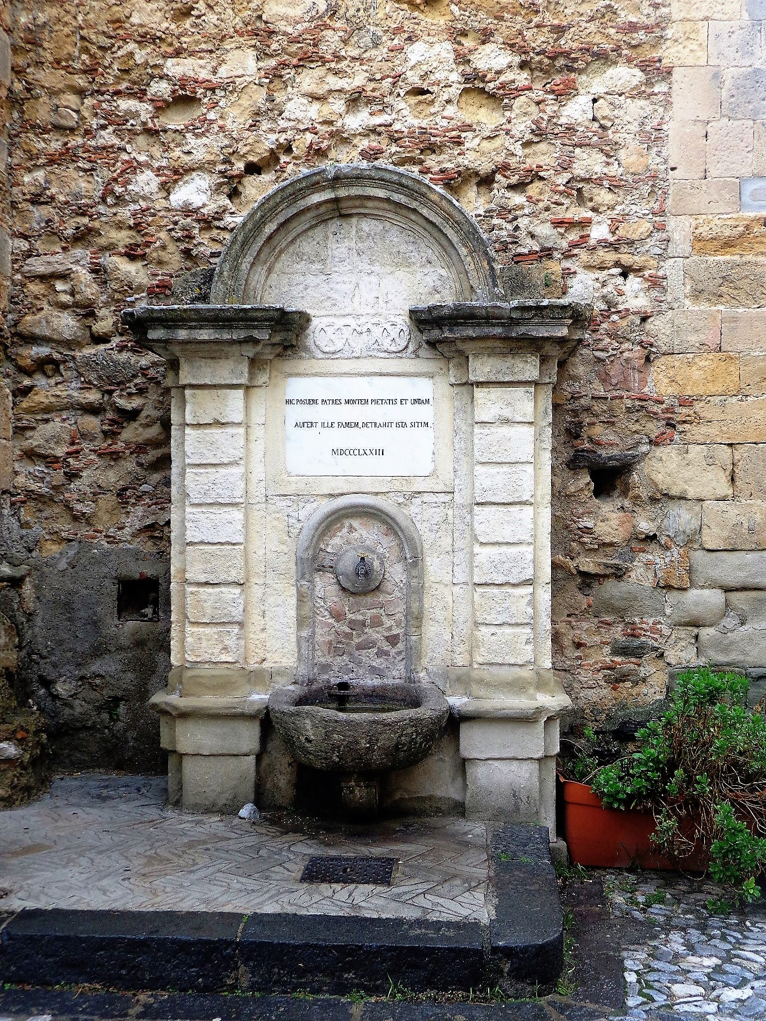 Fontana di Piazza Peculio. Foto d'archivio. Immagine già presente su Facebook, Panoramio e altre pagine personali.